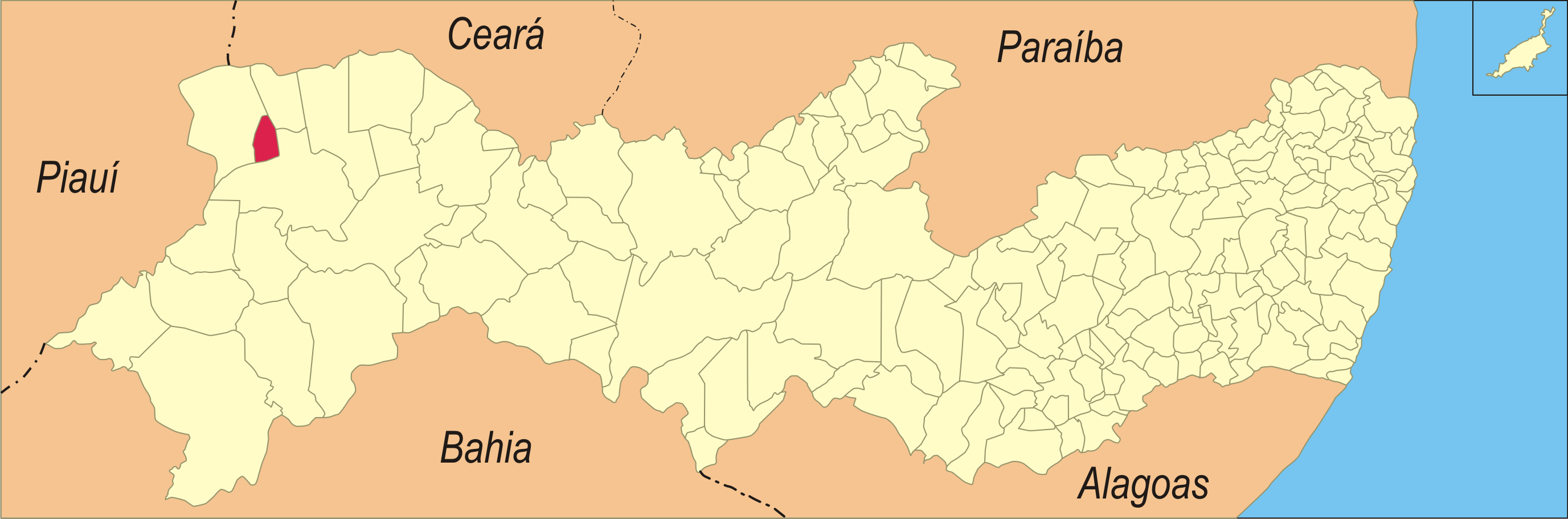 Localização da cidade em Pernambuco.